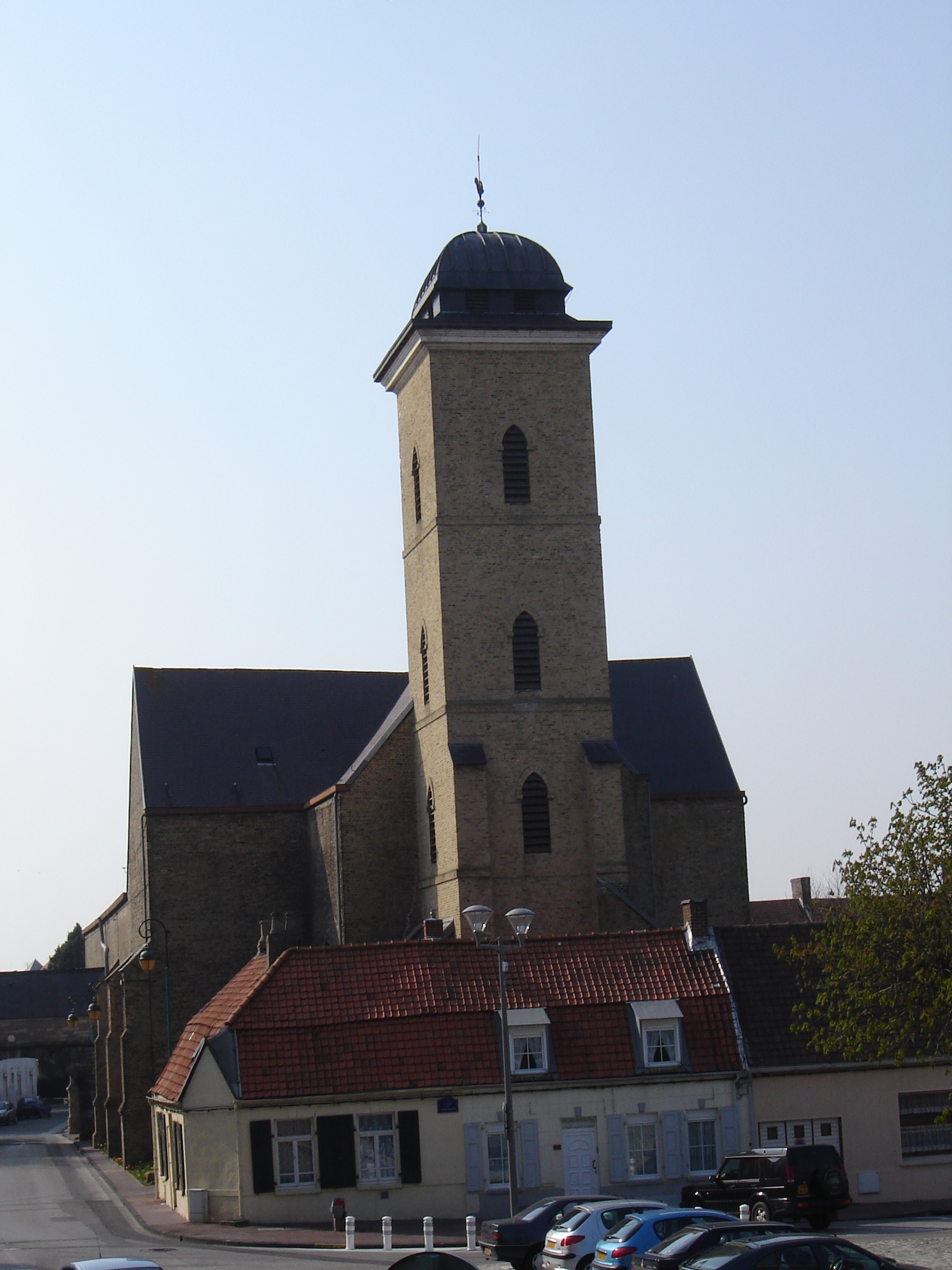 Eglise Saint-Willibrord in Gravelines, Nord, Nord-Pas-de-Calais, France